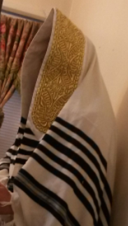 עטרה לטלית מצופה זהב